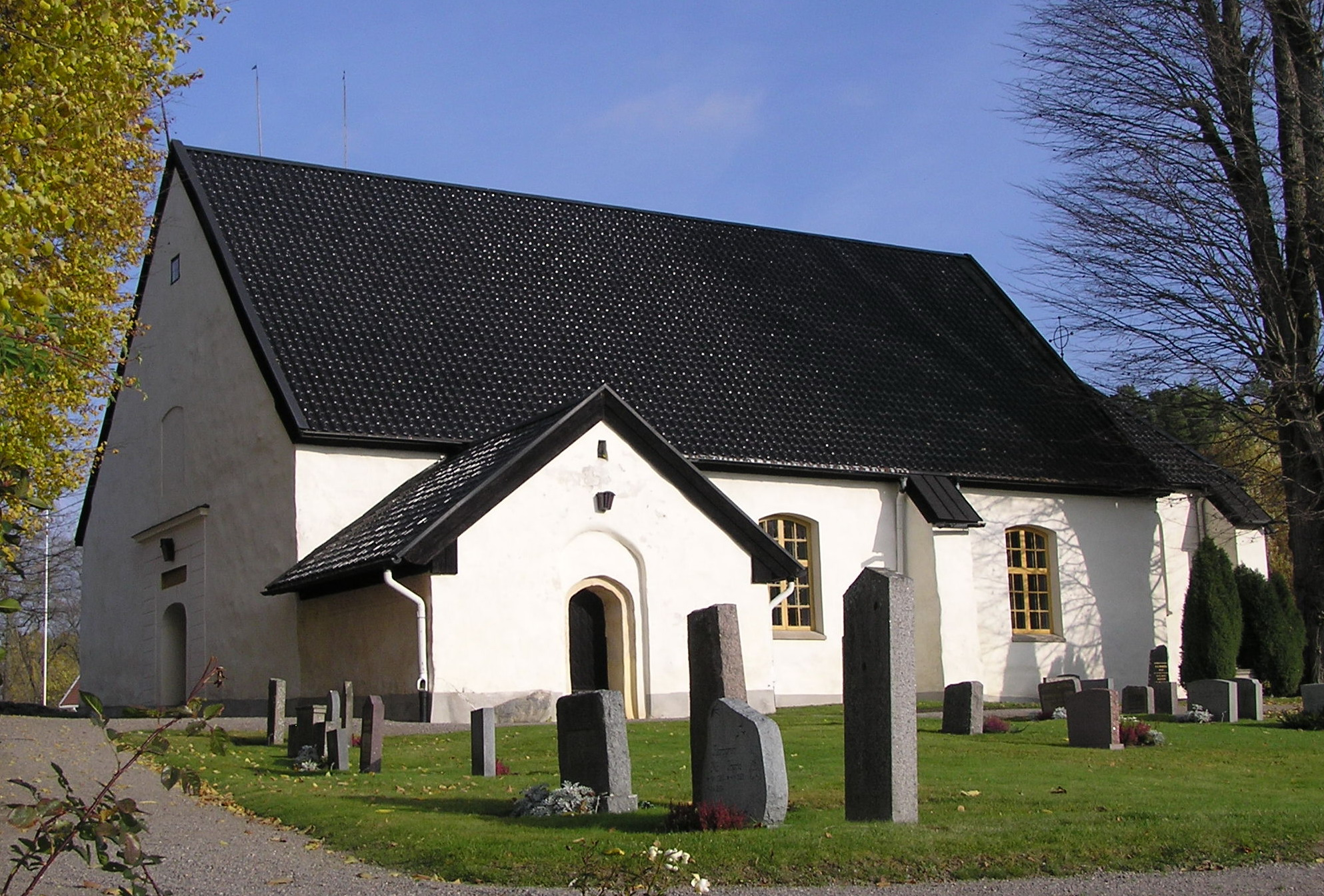 Helgesta kyrka, Södermanland. Från sydväst, oktober 2007.